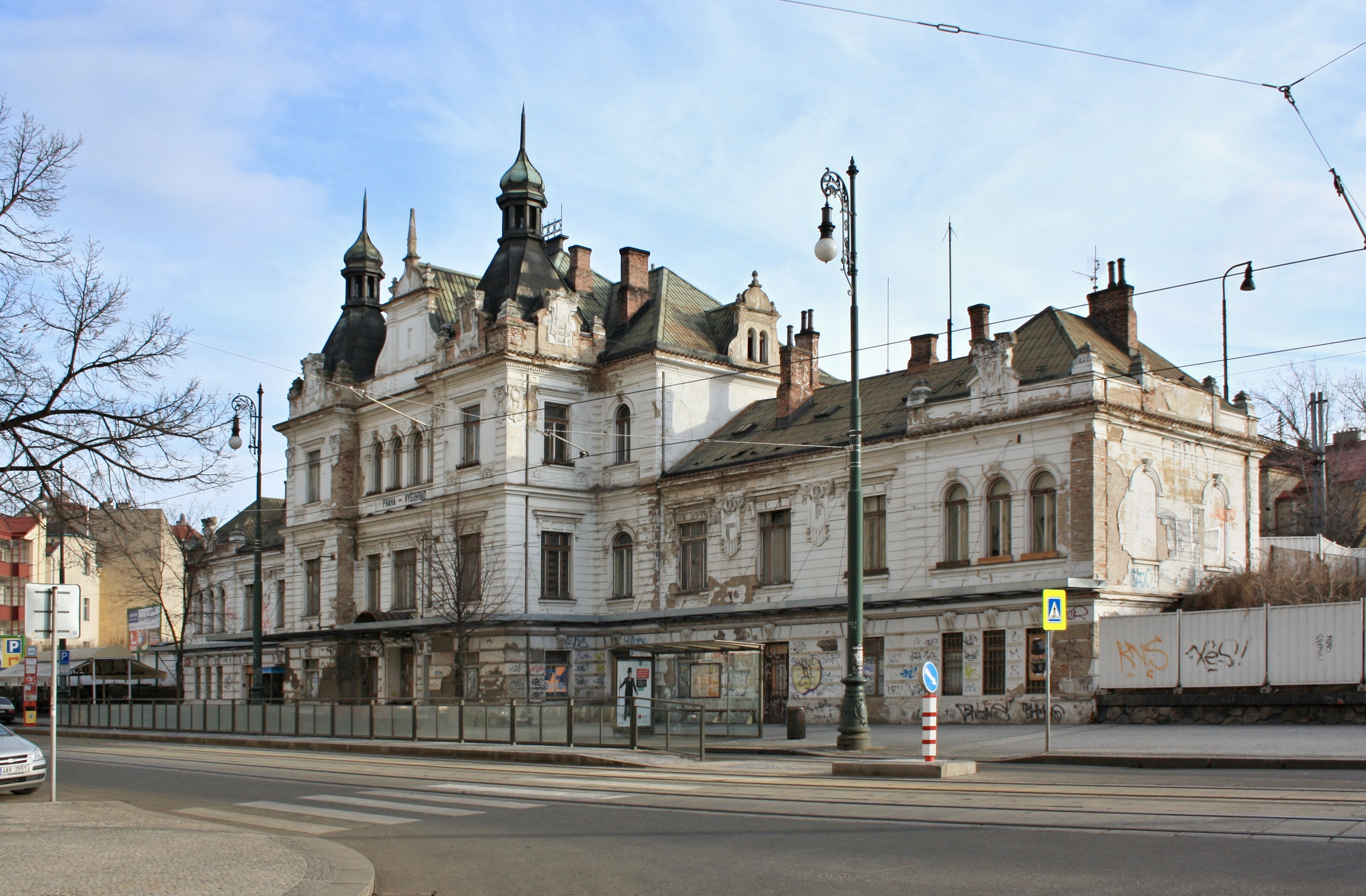 Praha